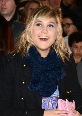 Bérengère Krief à la cérémonie des NRJ Music Awards 2014